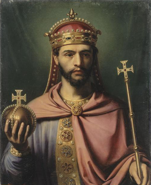 Commandé par Louis-Philippe pour le musée historique de Versailles en 1837